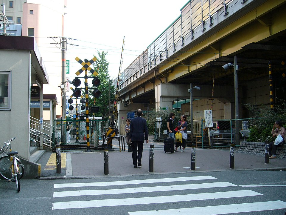 阪急京都本線南方駅（左手） 手前が京都方面、奥が梅田方面の入口。右手奥の高架下にあるのは大阪市営地下鉄御堂筋線の西中島南方駅（南口）。